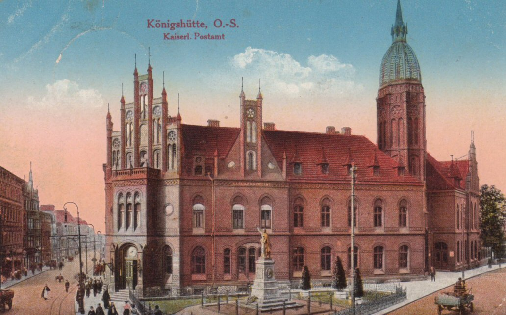 Königshütte/ Oberschlesien: Das Kaiserliche Postamt, davor das Kriegerdenkmal für die Gefallenen von 1870/71